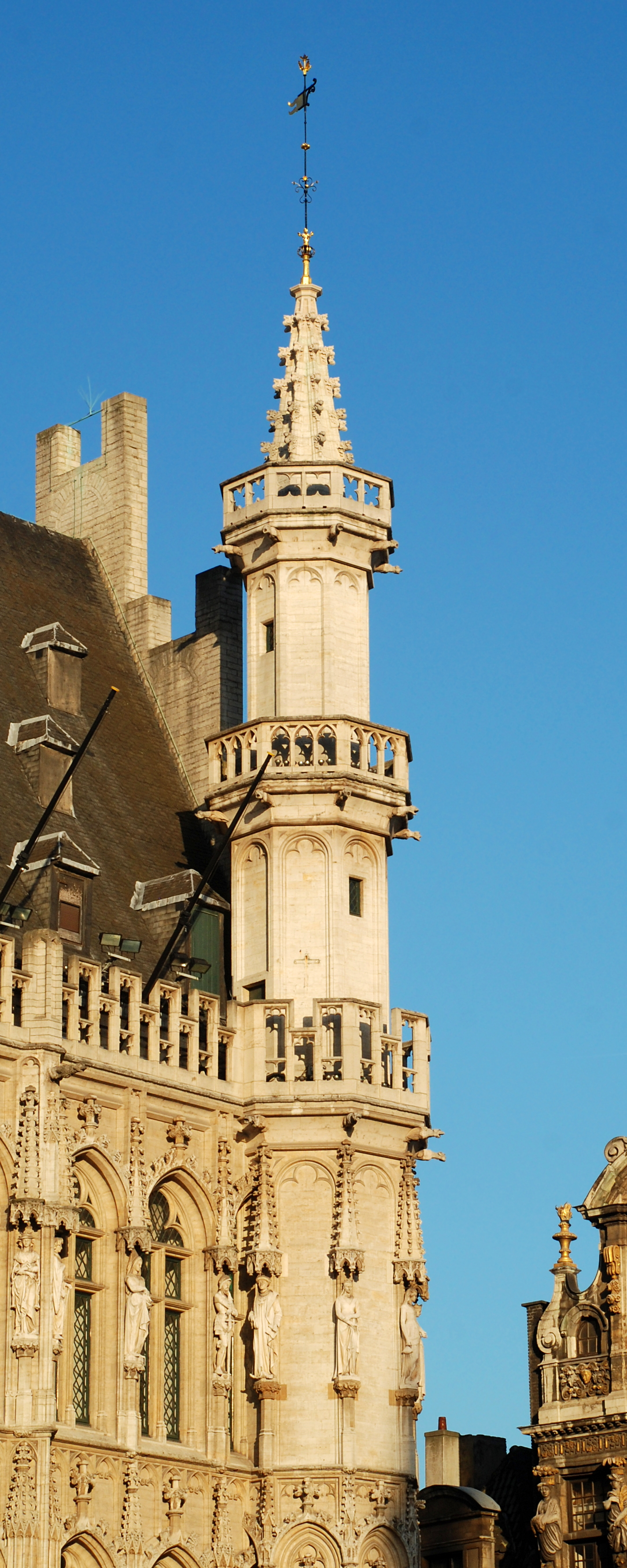 Belgique - Bruxelles - Hôtel de ville de Bruxelles - Tourelle d'angle